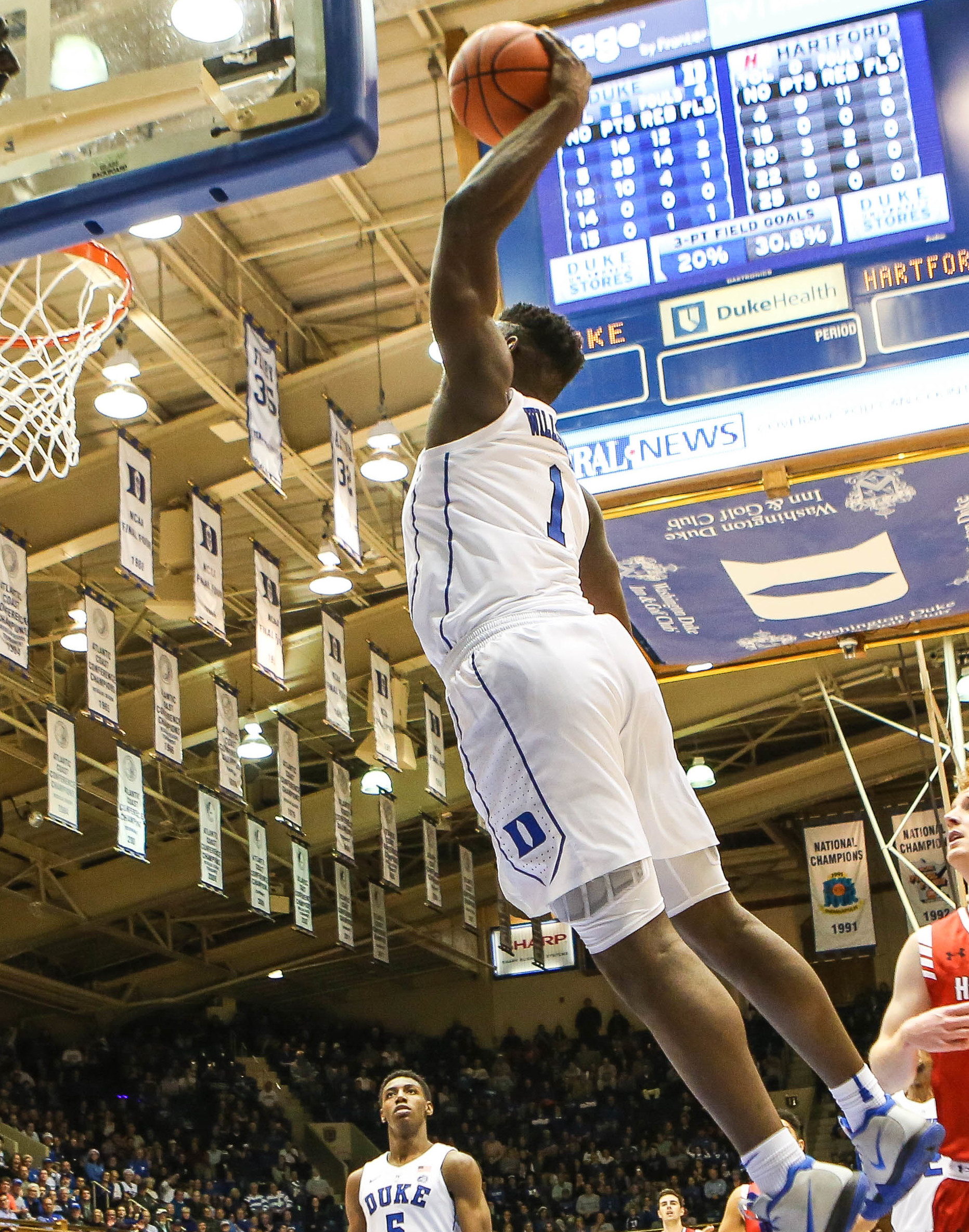 Zion Williamson :: Duke Men's Basketball NCAA :: Keenan Hairston